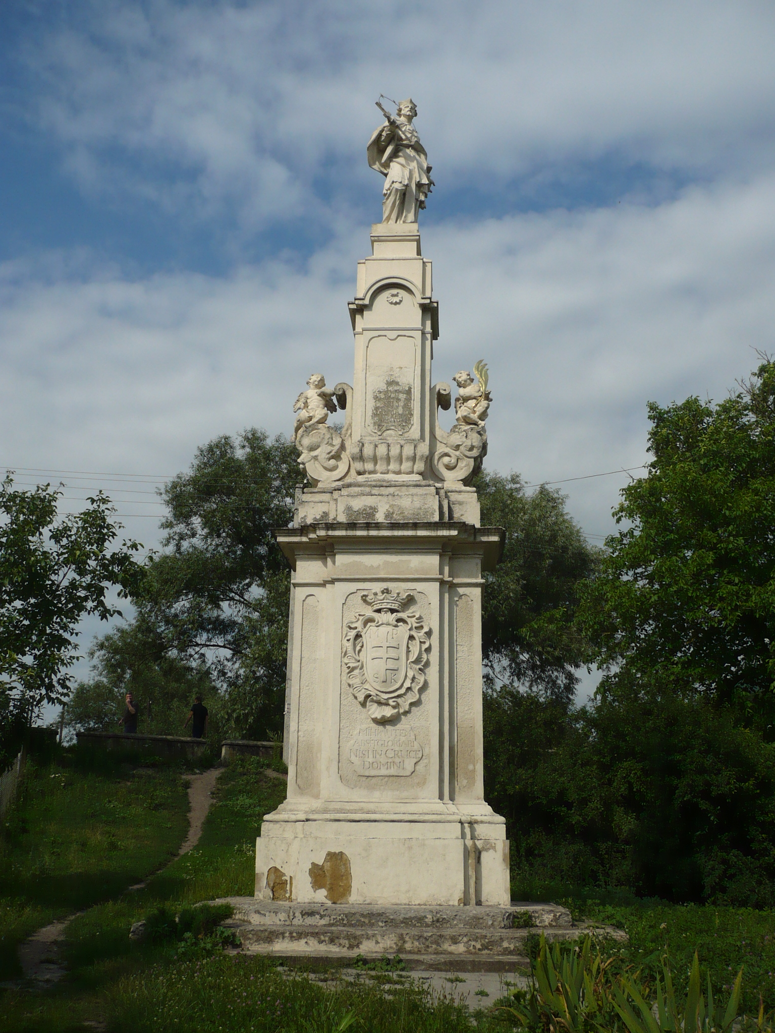 Buczacz.Nepomuk